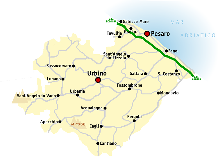 Kaart van de provincie Pesaro-Urbino